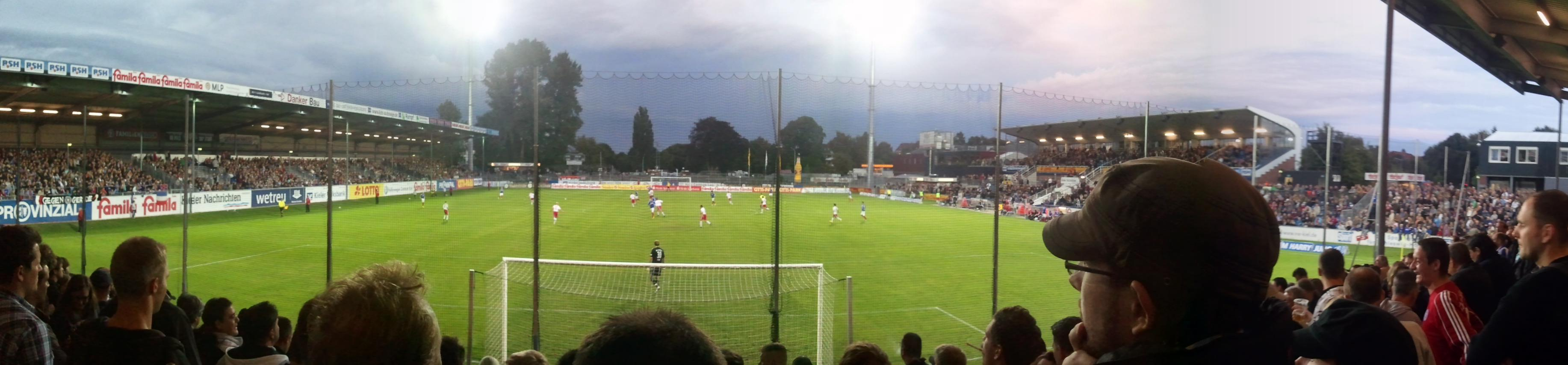 Panoramafoto des Holstein-Stadions in Kiel, aufgenommen aus Block I